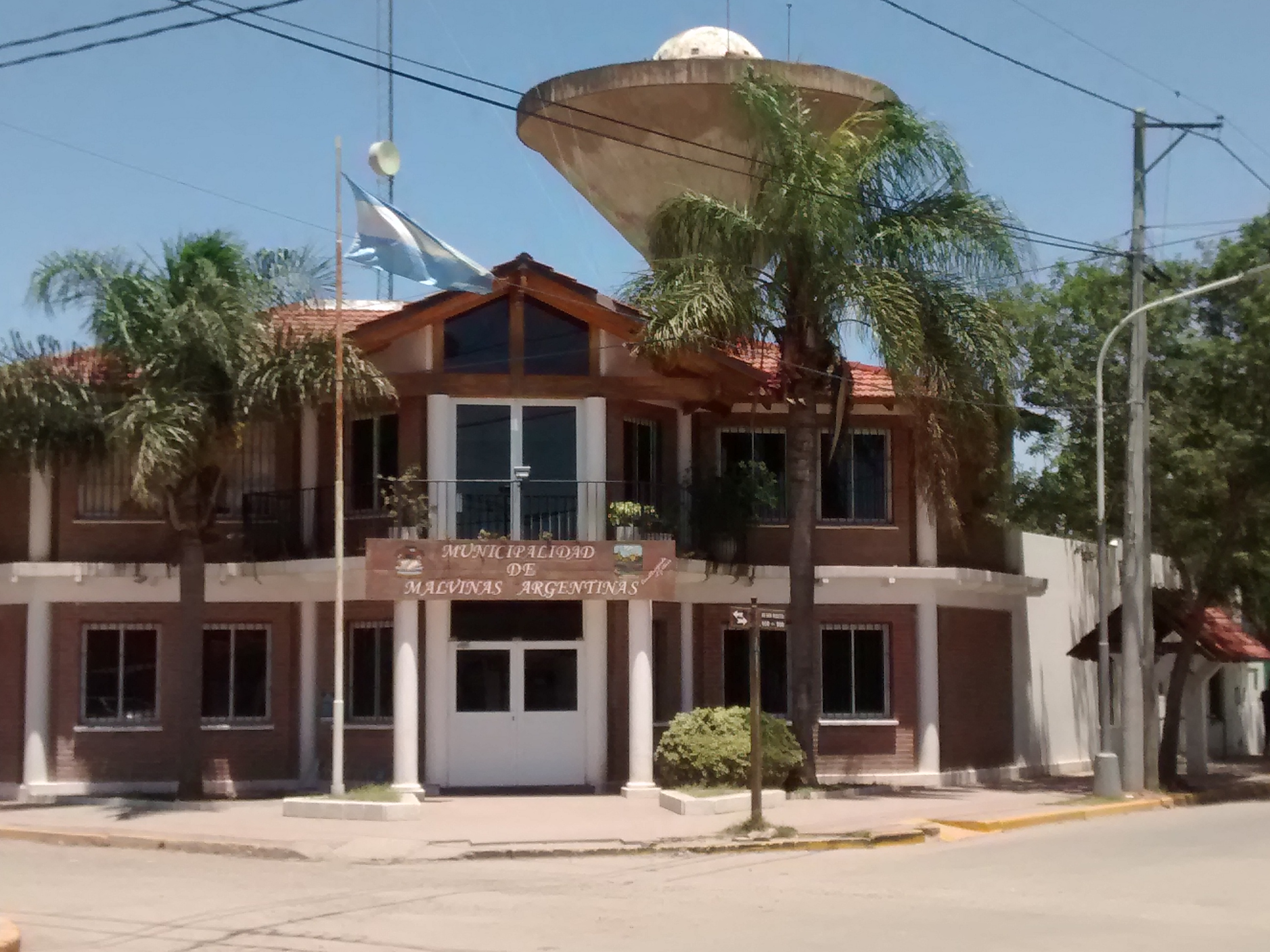 Municipalidad de Malvinas Argentinas, Córdoba, departamento Colón. Está ubicado en la esquina de las calles Tucumán y Avenida San Martín. Tomando la cara Noroeste.